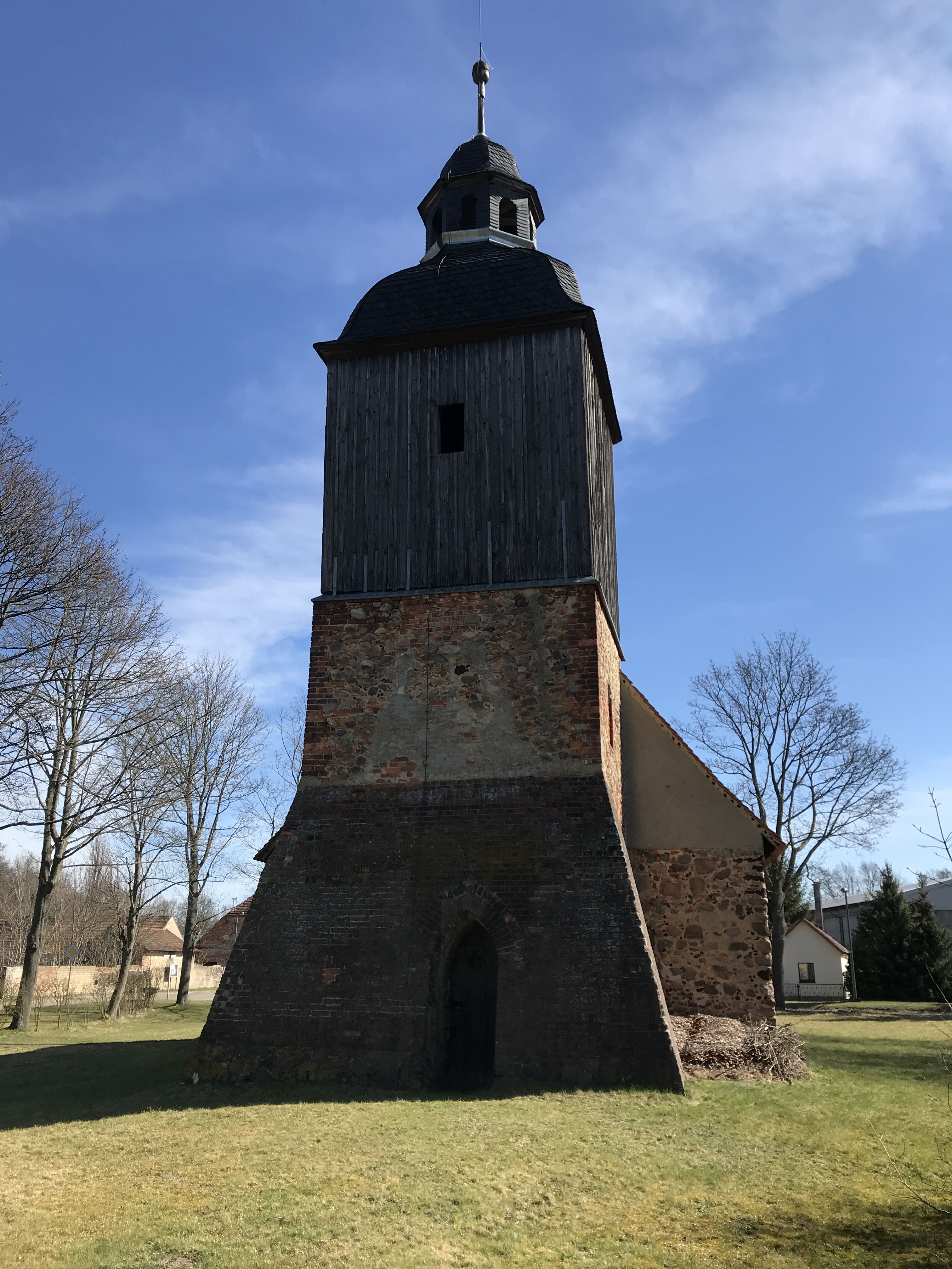 Die Dorfkirche in Kemmen der Stadt Calau entstand vermutlich im 15. Jahrhundert und wurde in den Jahren 1649 bis 1652 erneuert. Im Innern steht unter anderem ein Altaraufsatz von Andreas Schultze aus dem Jahr 1649.